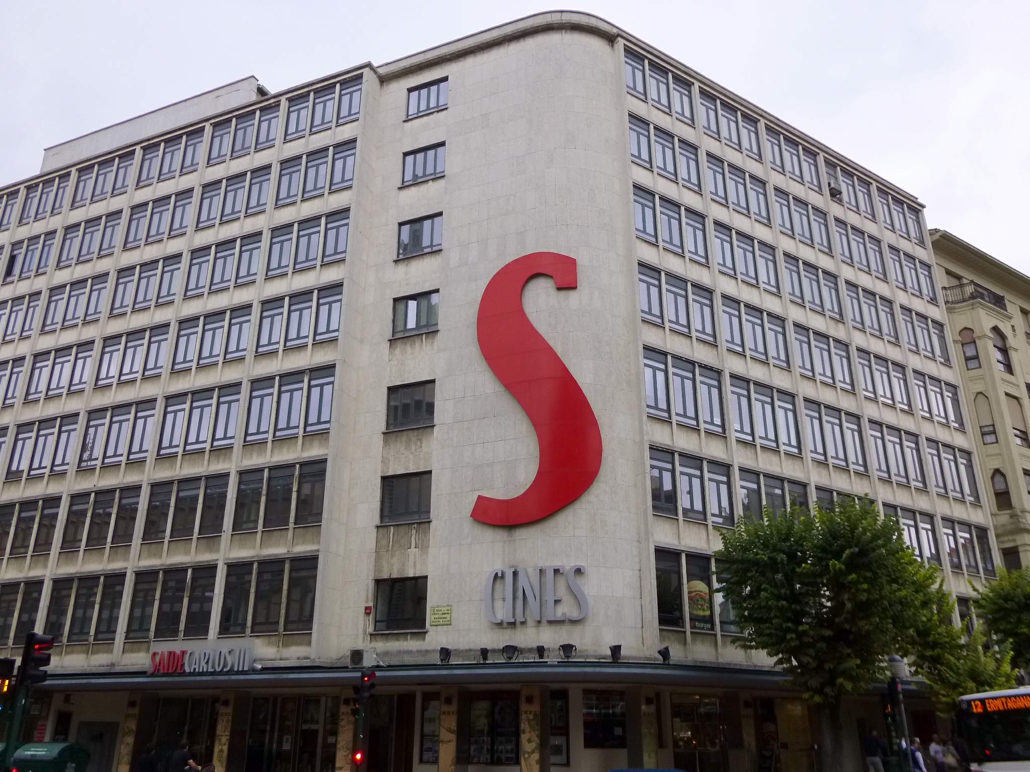 Pamplona